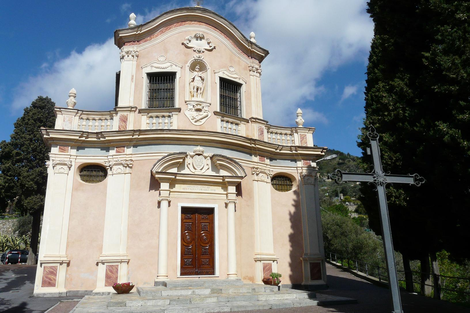 Chiesa di San Sebastiano, Moglio, Alassio, Liguria, Italia